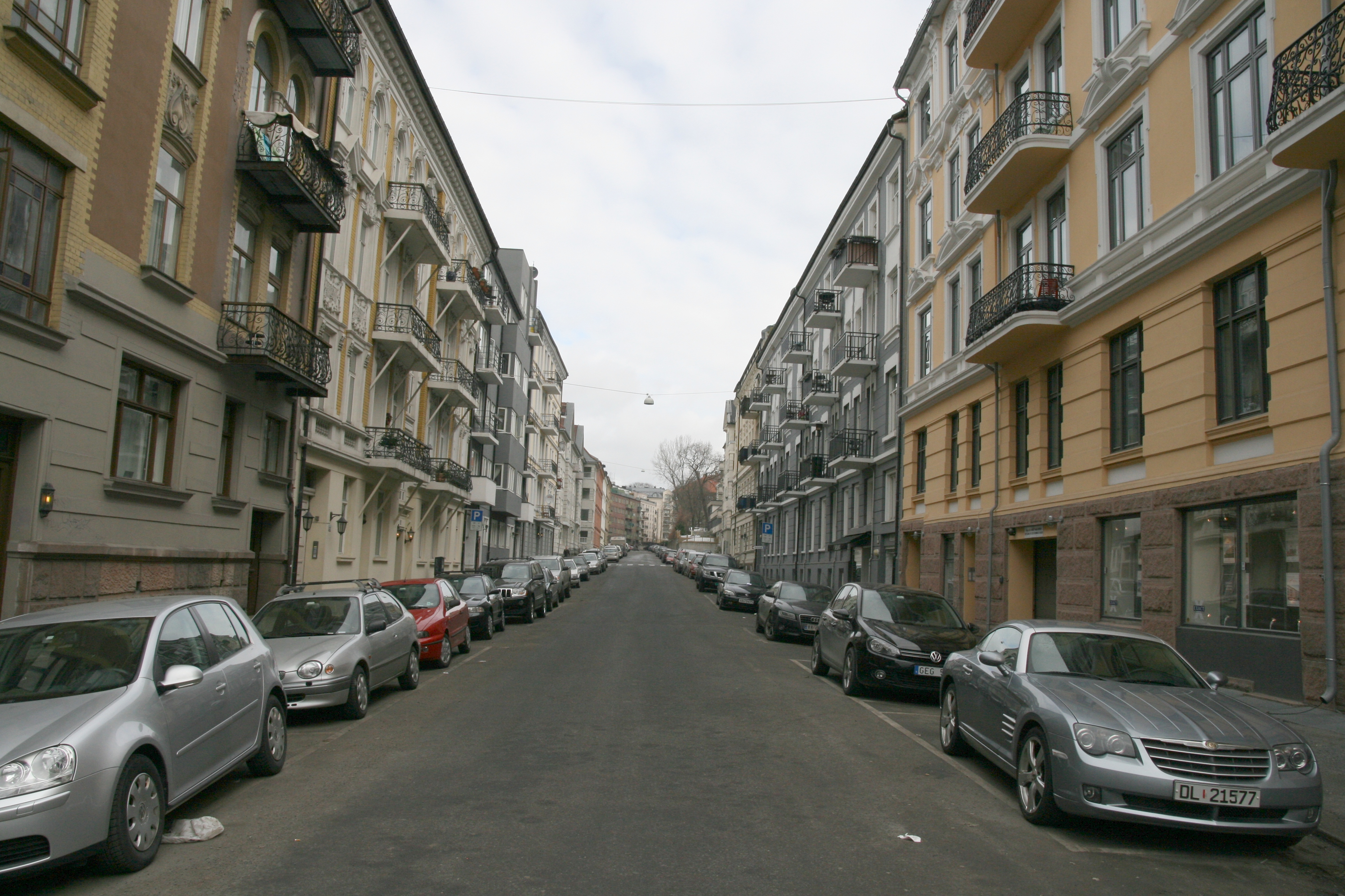 Erling Skjalgssons gate på Frogner i Oslo, sett fra krysset med Bygdøy allé.